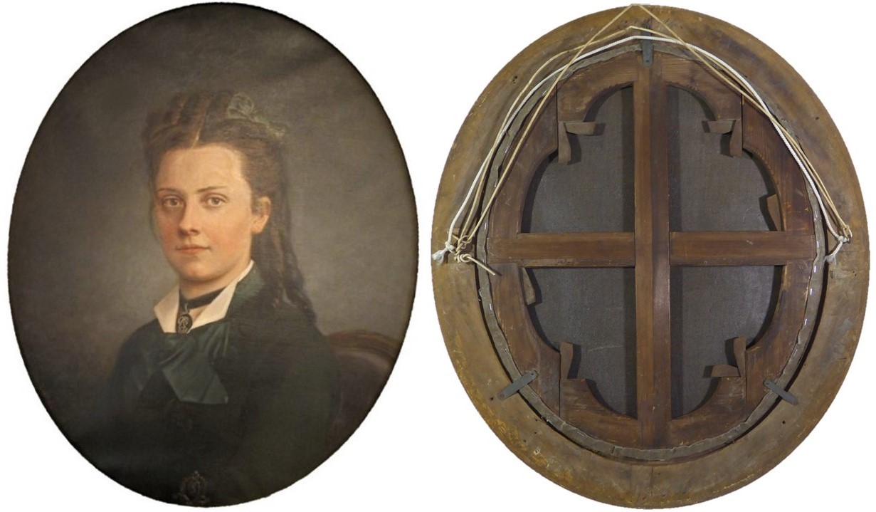 Lucie Jamin, première épouse de Henri Becquerel par Truchelut / Musée de l'ancien Hôtel Dieu de Châtilon-Coligny